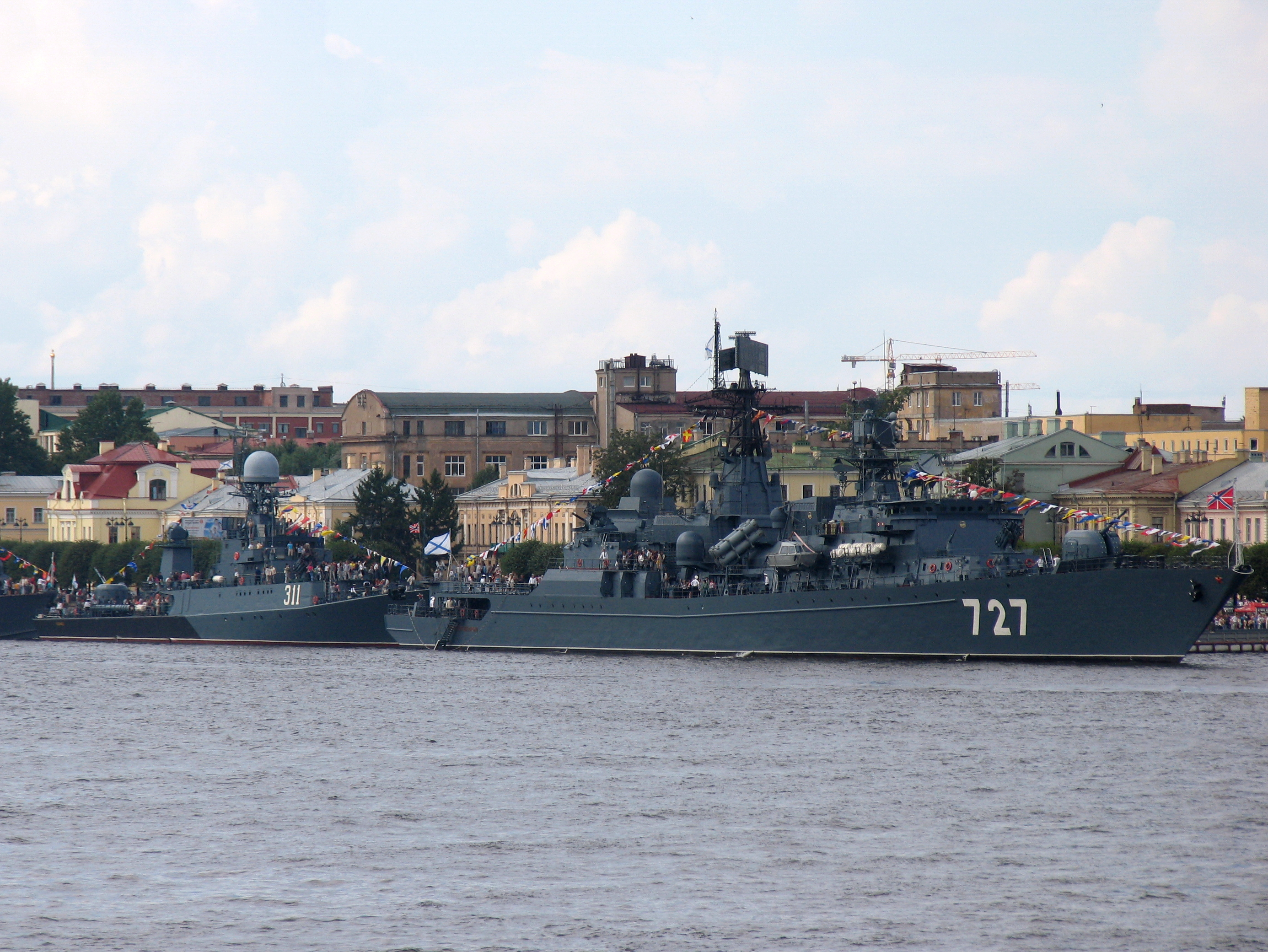 Сторожевой корабль "Ярослав Мудрый" и малый противолодочный корабль "Казанец"